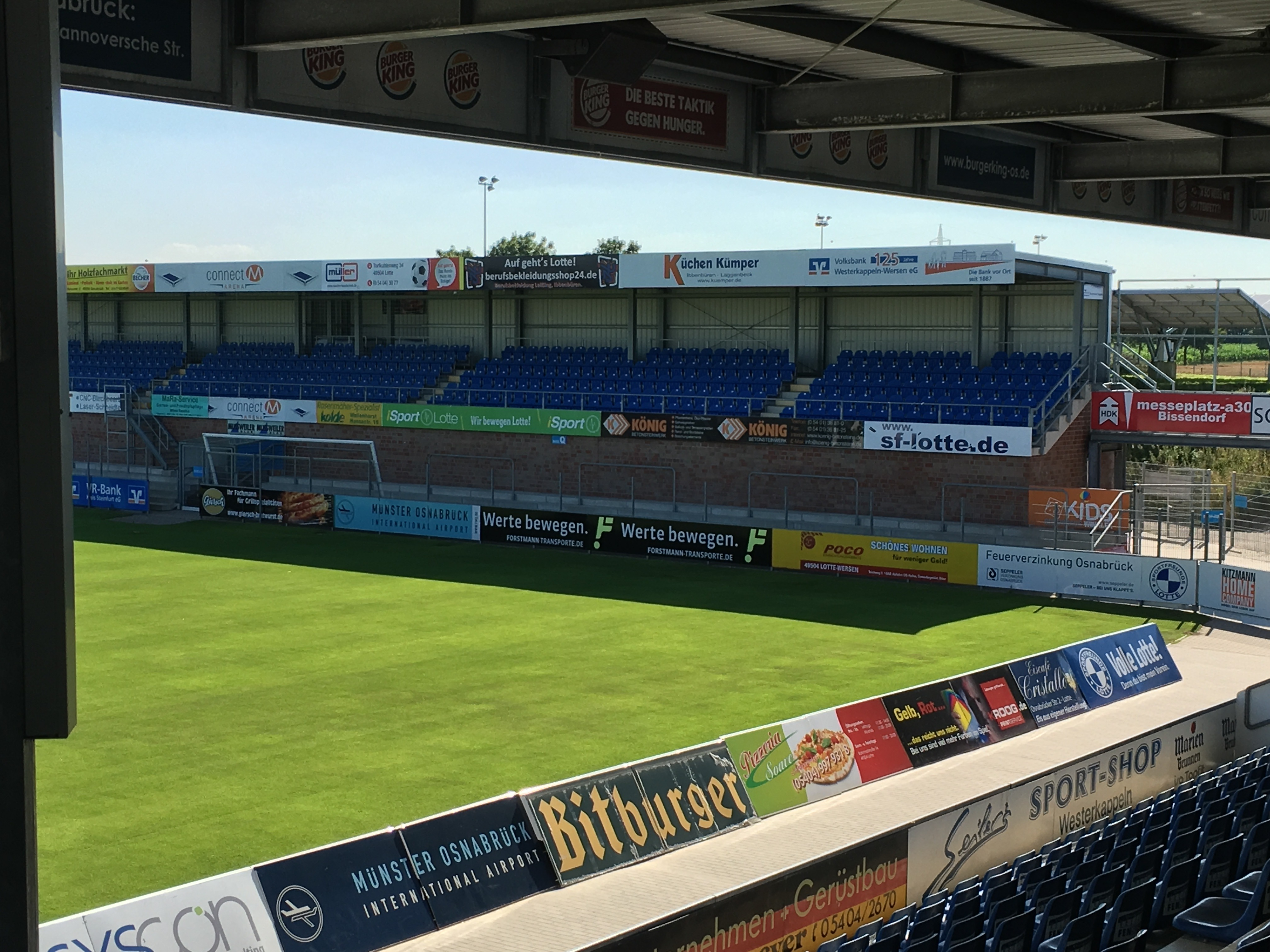 Das Frimo Stadion der Sportfreunde Lotte.